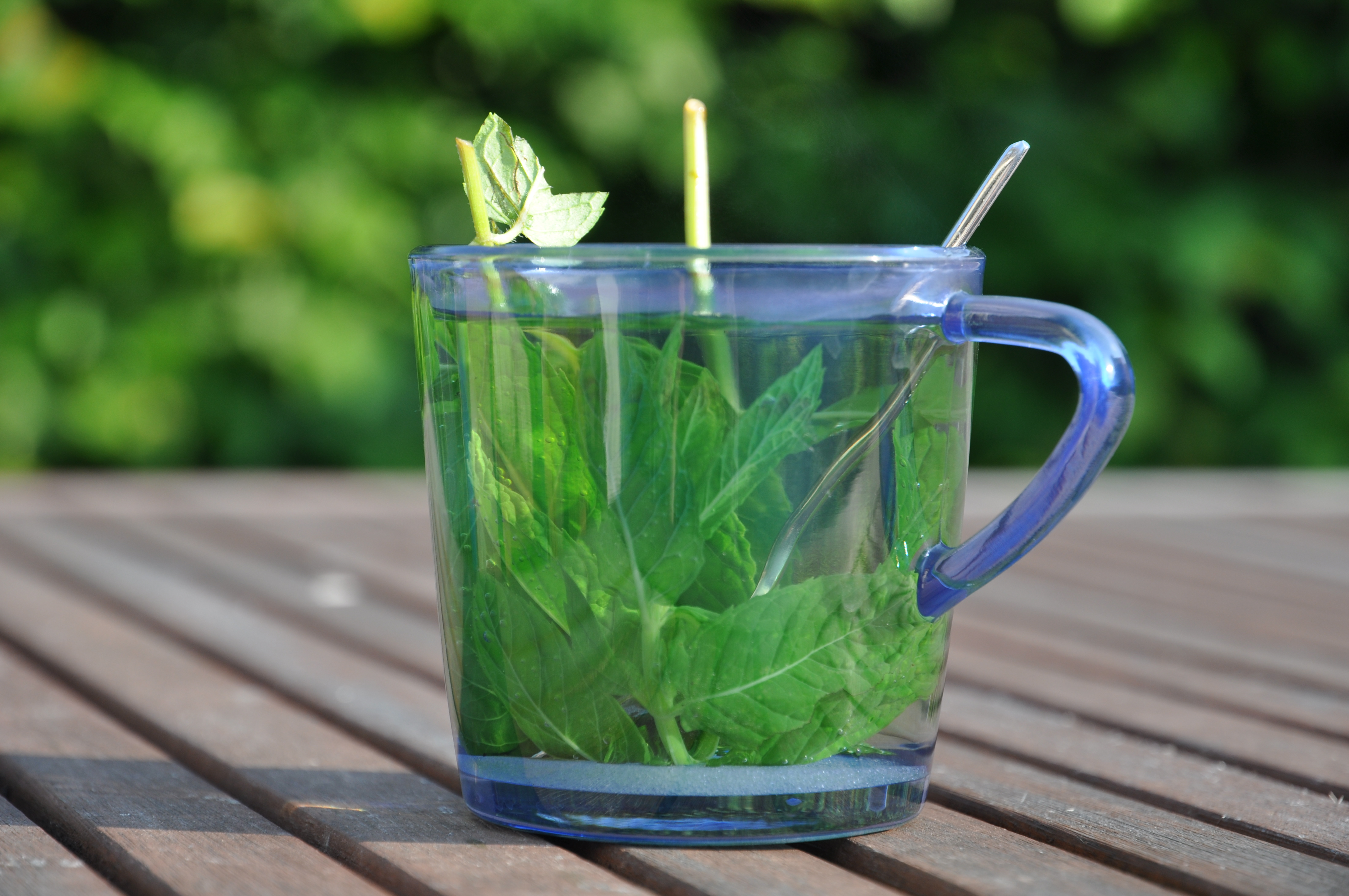 Een glas muntthee. Hiervoor wordt kokend water op de blaadjes van de aarmunt gegoten in een glas.